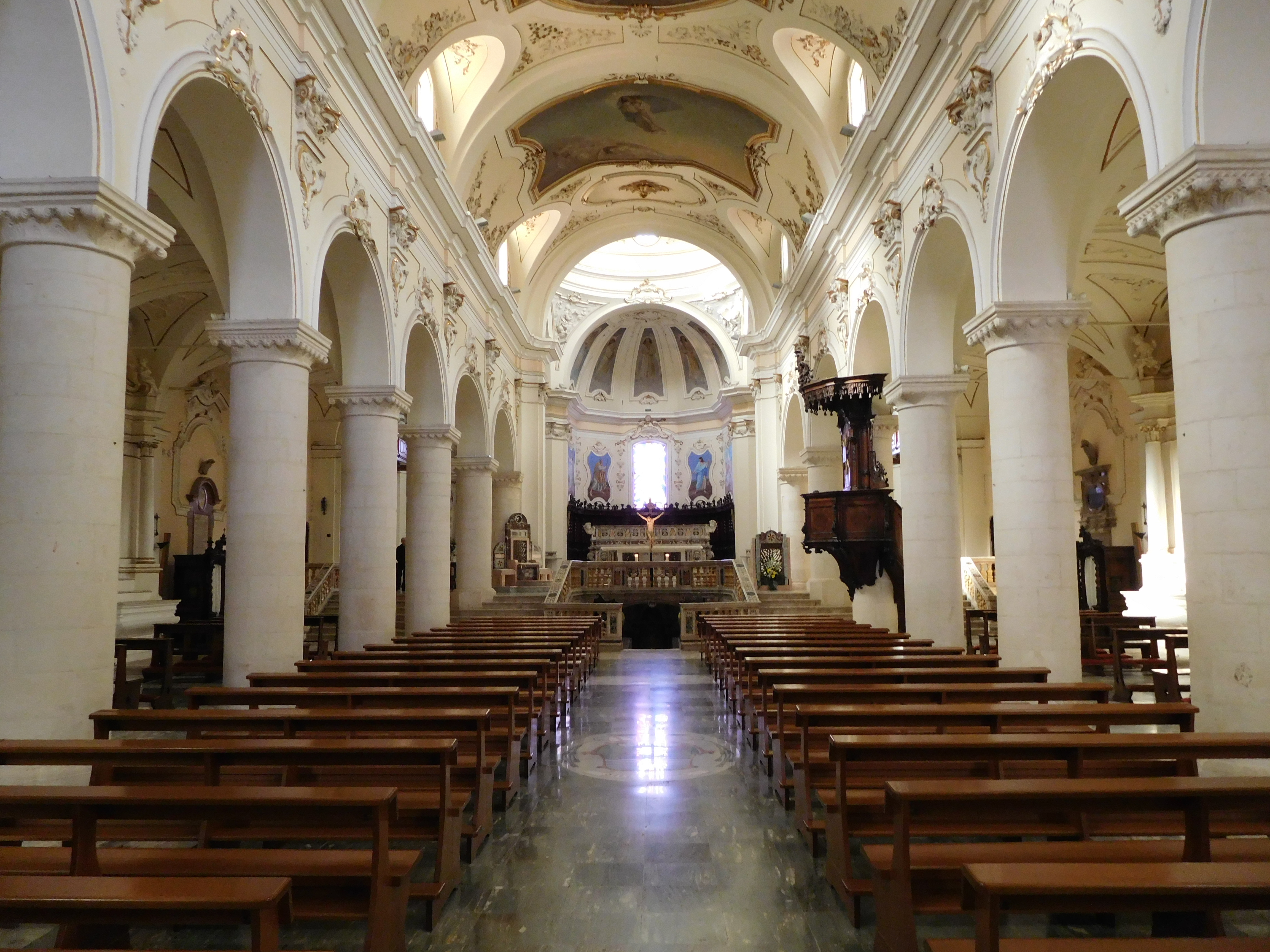 Chiesa di San Panfilo, Sulmona